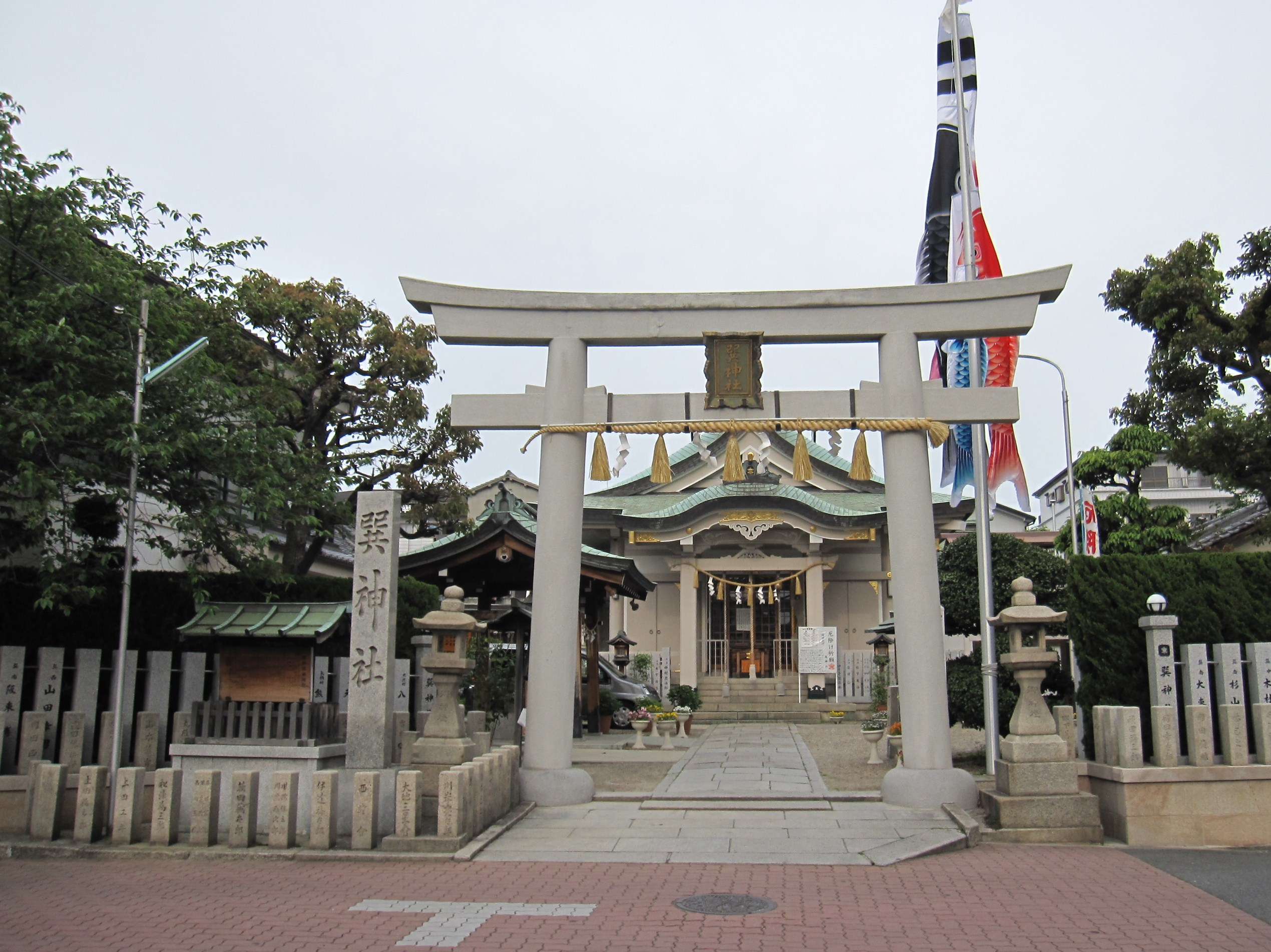 大阪市の巽神社